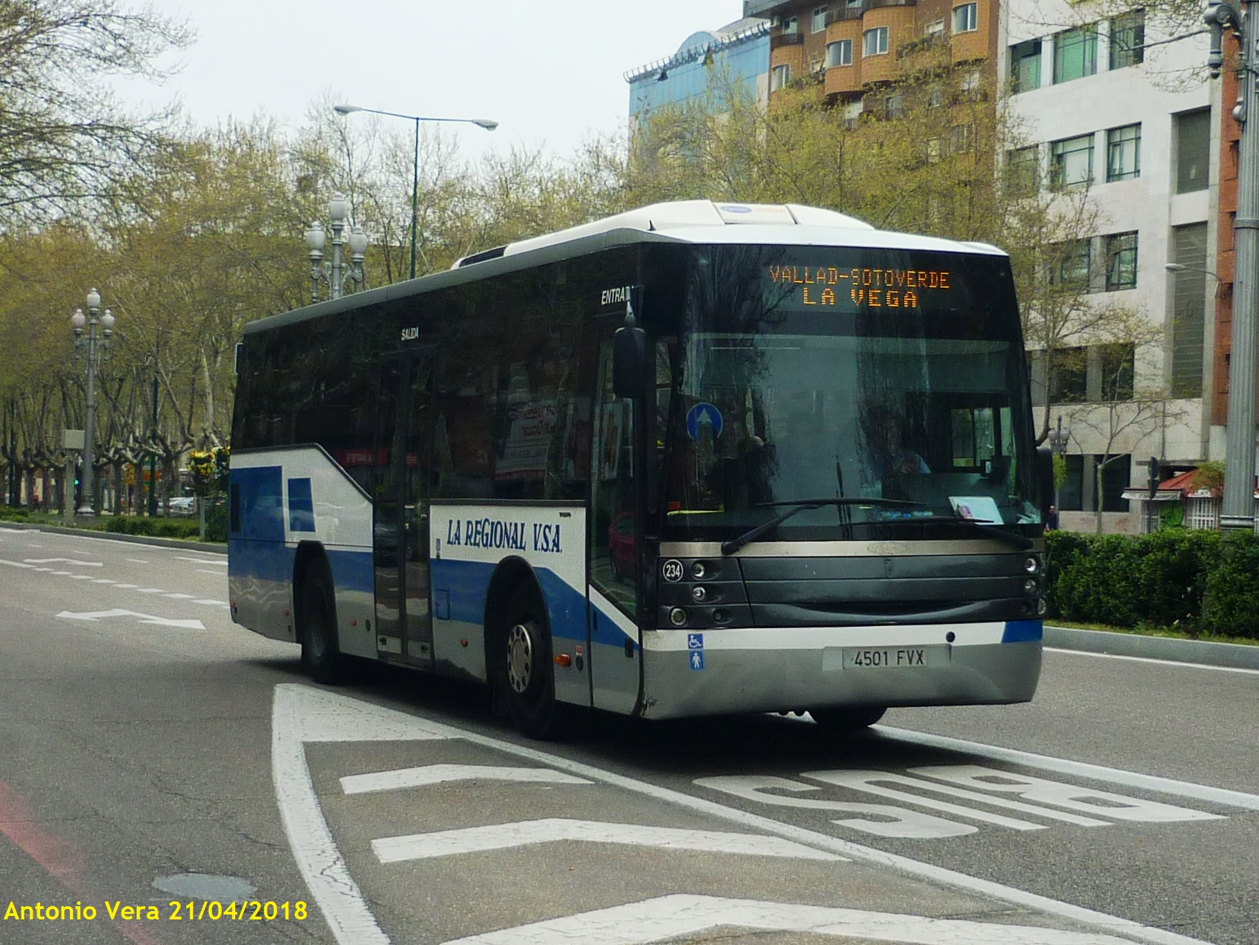 234_LaRegional